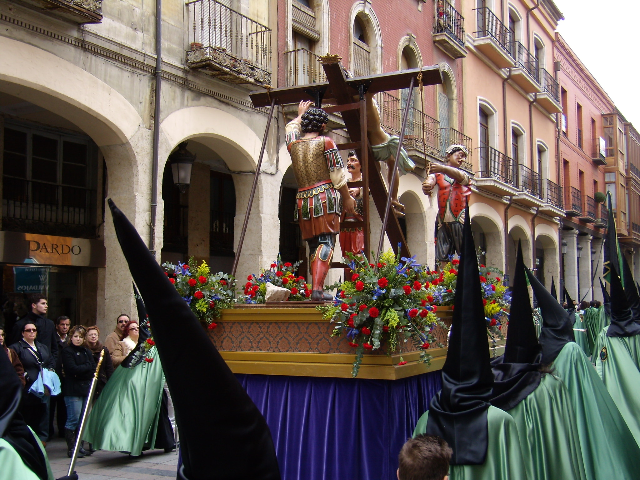 Erección de la Cruz, de Lucas Sanz de Torrecilla (1614). Semana Santa de Palencia.